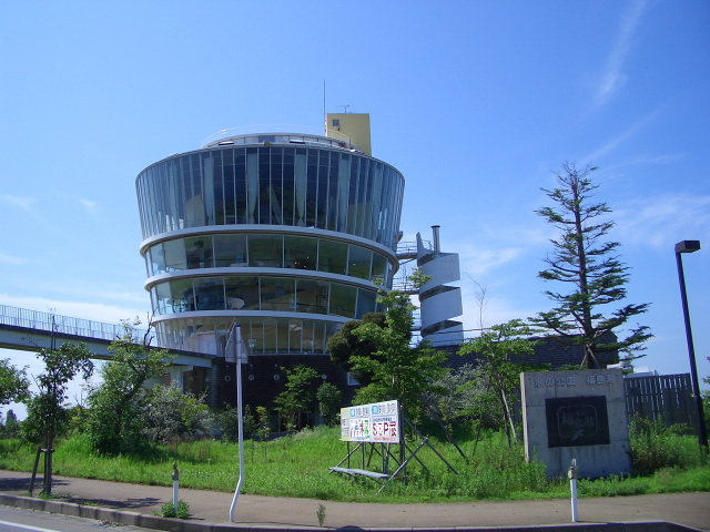 水の駅 ビュー福島潟